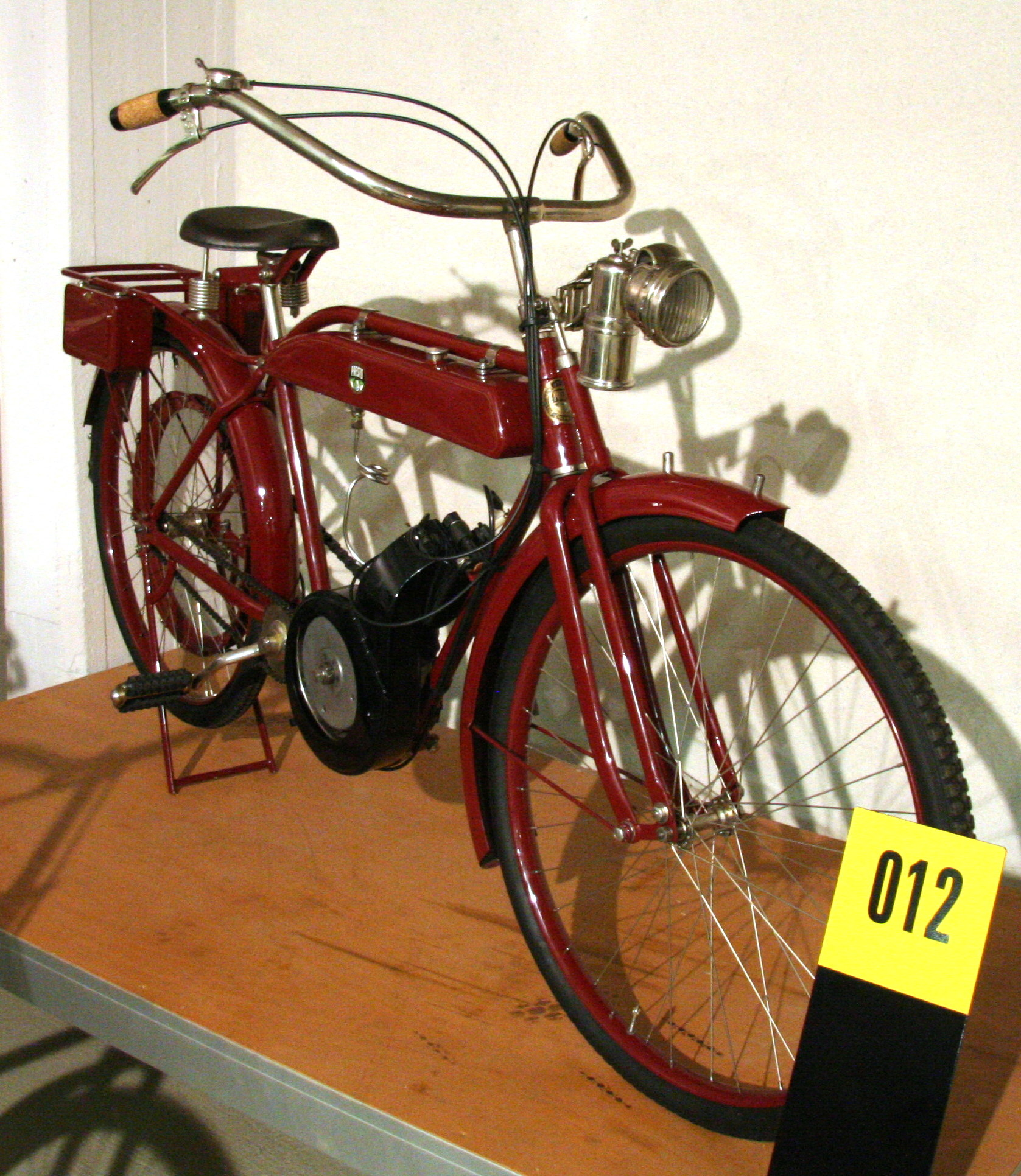 Presto 1,5 PS, Zweitakt-Motor (DKW) mit Zwangskühlung, 143 cm³, ohne Kupplung und Getriebe, Gewicht 45 kg, Baujahr 1925 im Museum für sächsische Fahrzeuge in Chemnitz.